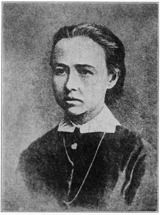 Sophia Perovskaya